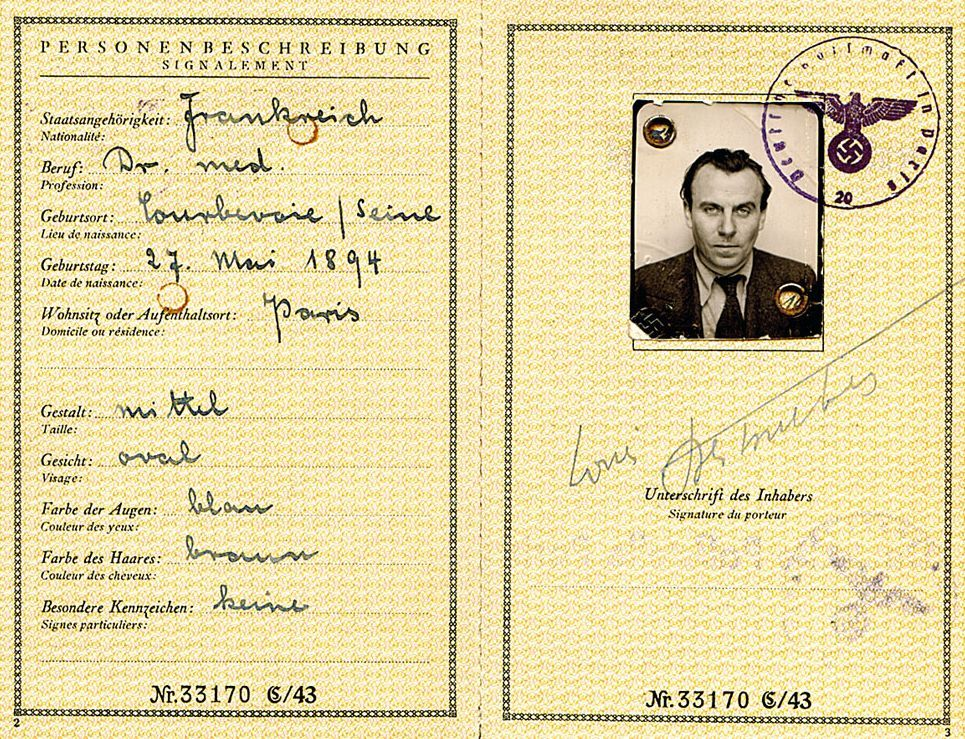 Fremdenpass (passeport provisoire d'étranger) fourni à Céline sous l'Occupation : ce document lui servit à fuir la France pour l'Allemagne, puis le Danemark (collection François Gibault).